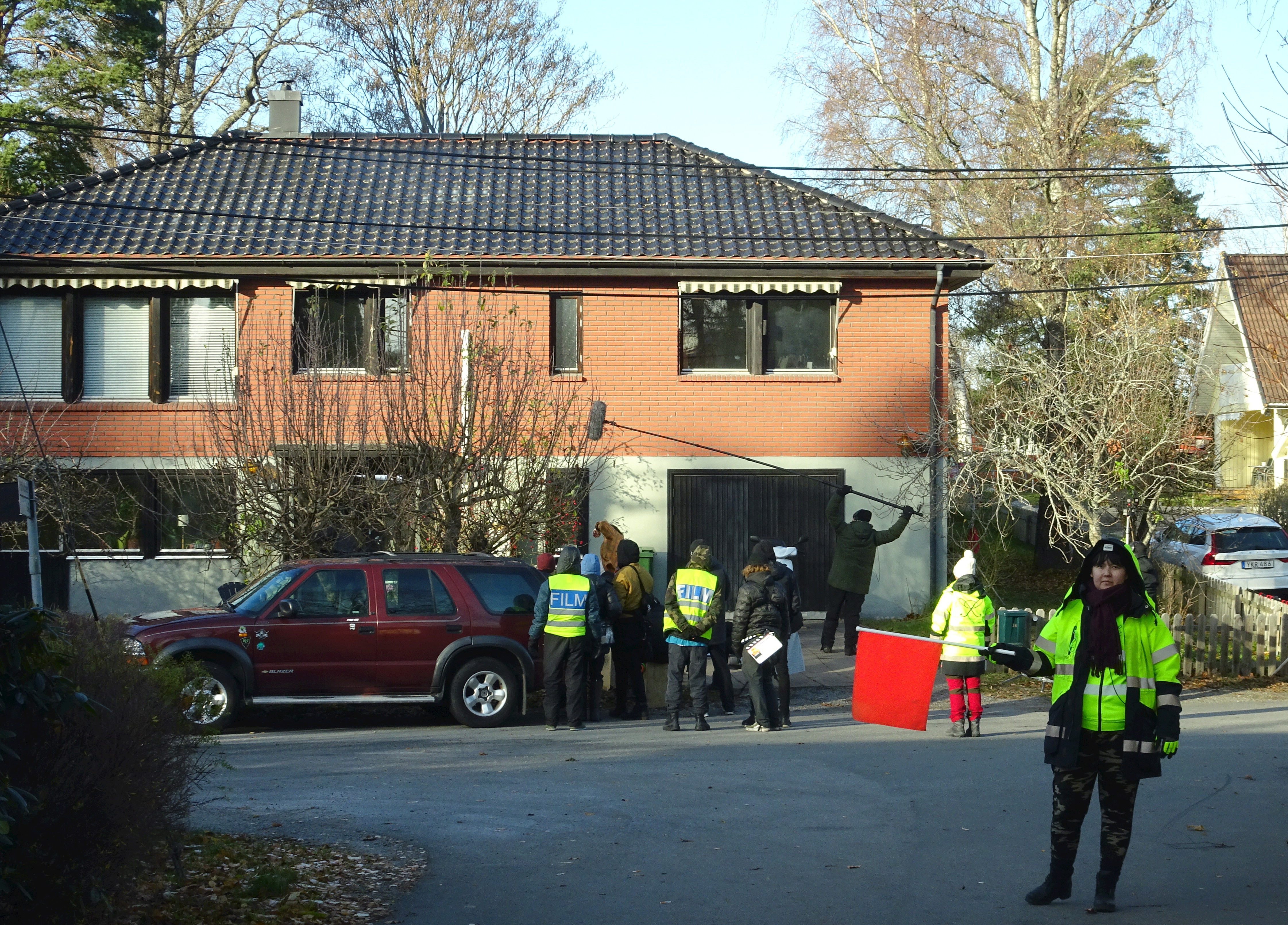 We Got This, filminspelning, Kapellvägen 26, Segeltorp